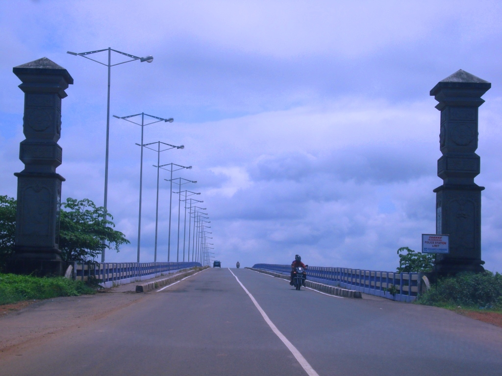 ഗോശ്രീ‍പാലം, എറണാക്കുളം